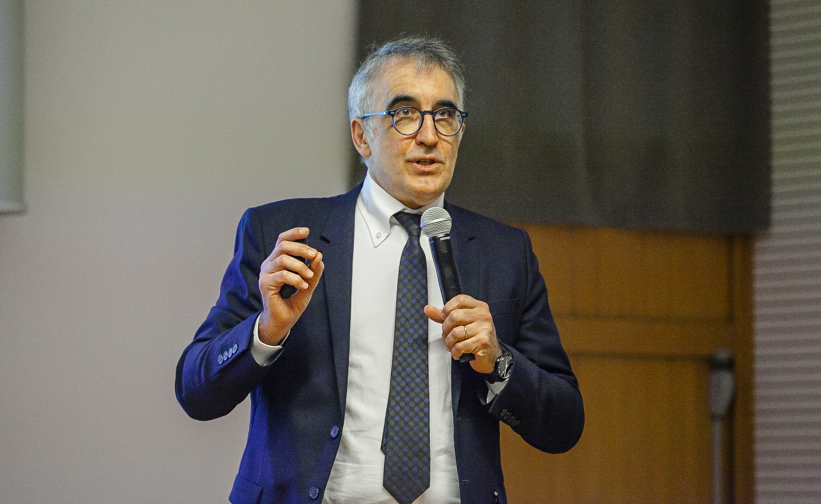 Angelo Riccaboni in 2017.